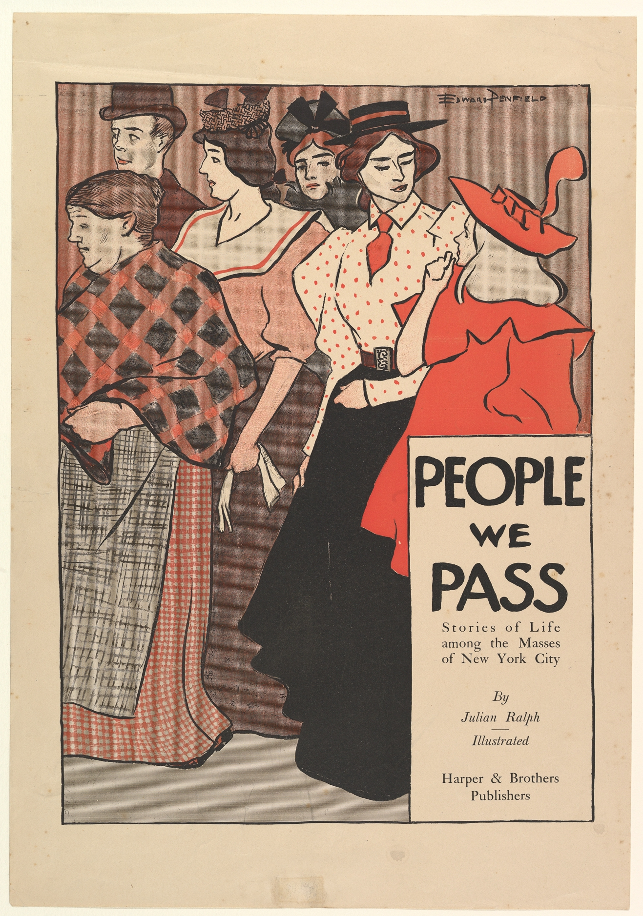 Print; Poster; Prints